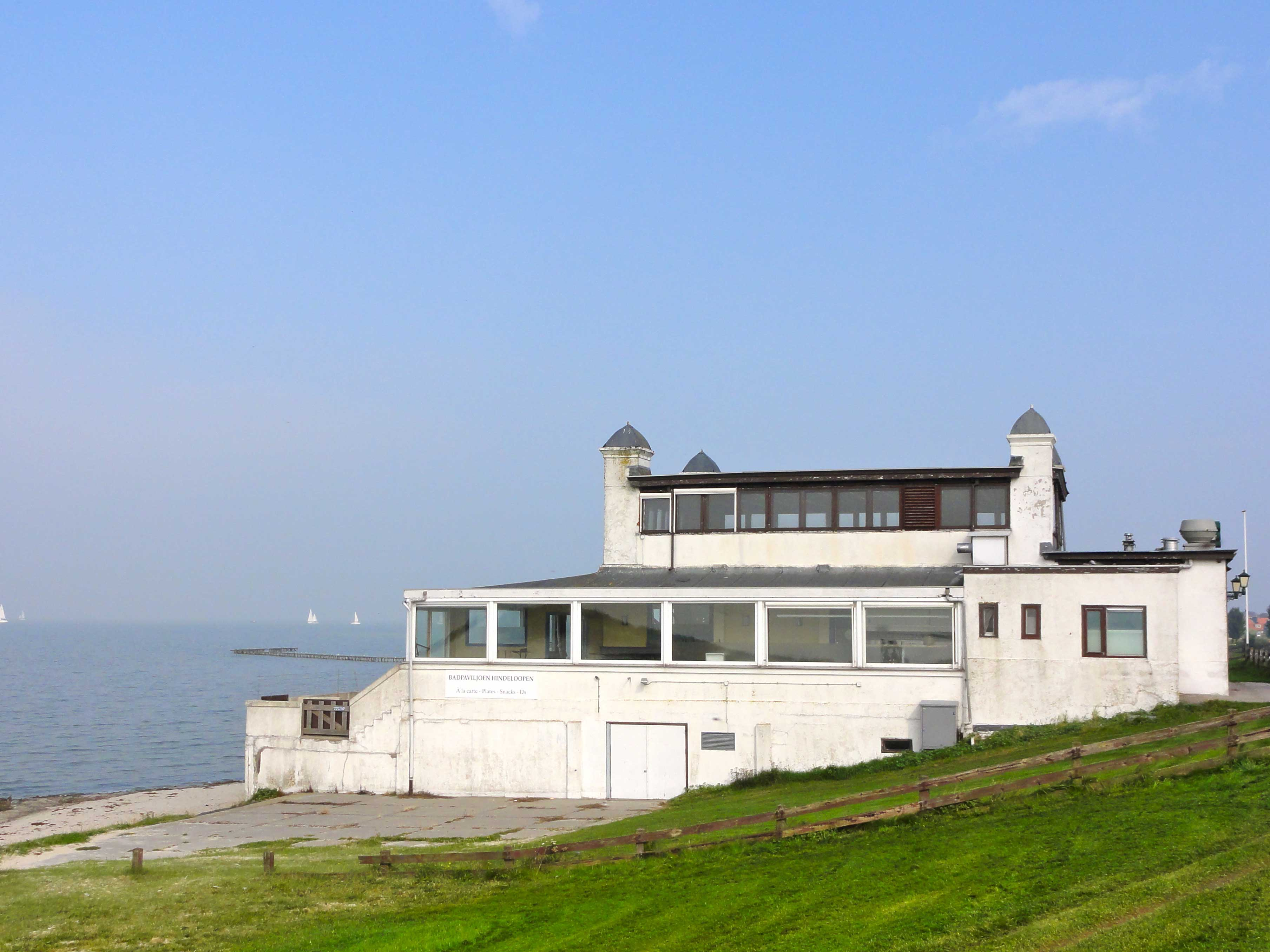 Badpaviljoen nabij Hindeloopen